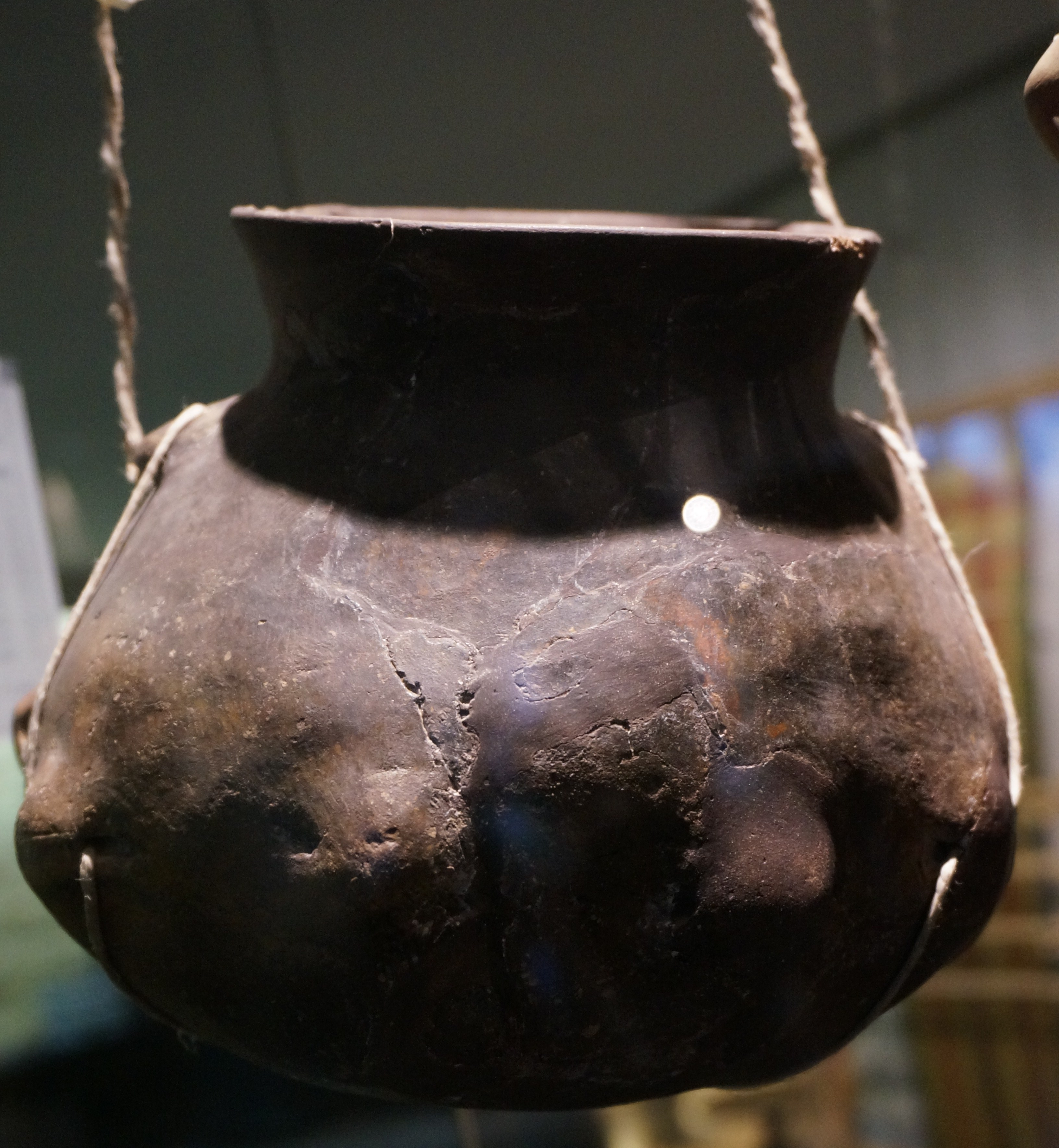 Fouilles à Mairy,_cruche_à_suspension, Michelsberg .